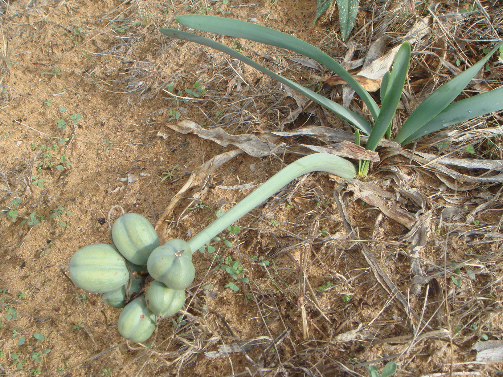 Pancratium maritimum, Azucena de mar, Chiclana (Cádiz),España.